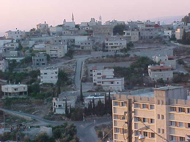 ibiilin village in Israel.